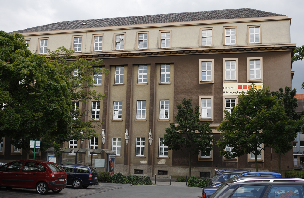 Das Foto zeigt das Stadthaus in Hamm.